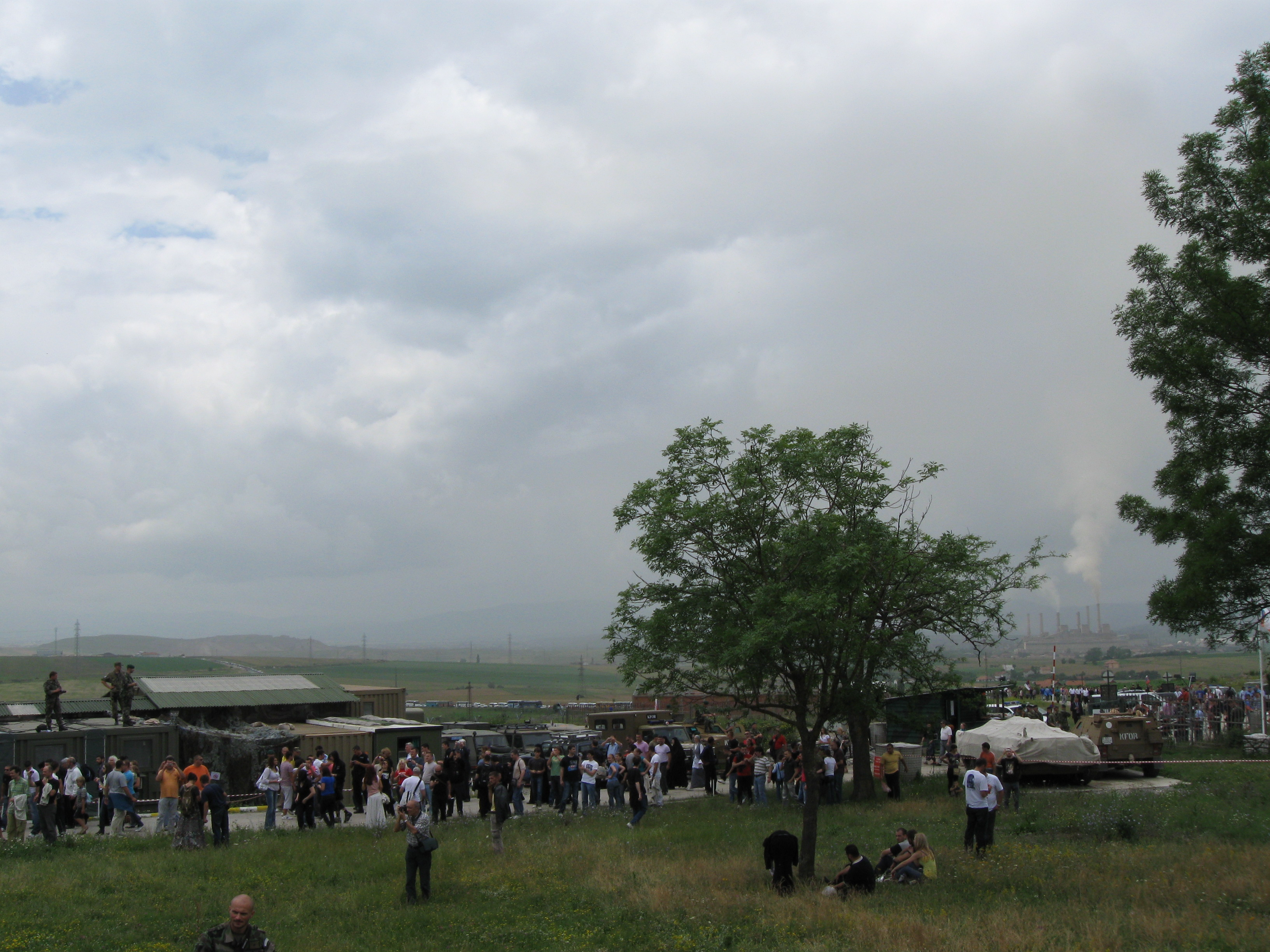 Od 1999.Gazimestan obezbeđuju međunarodne snage